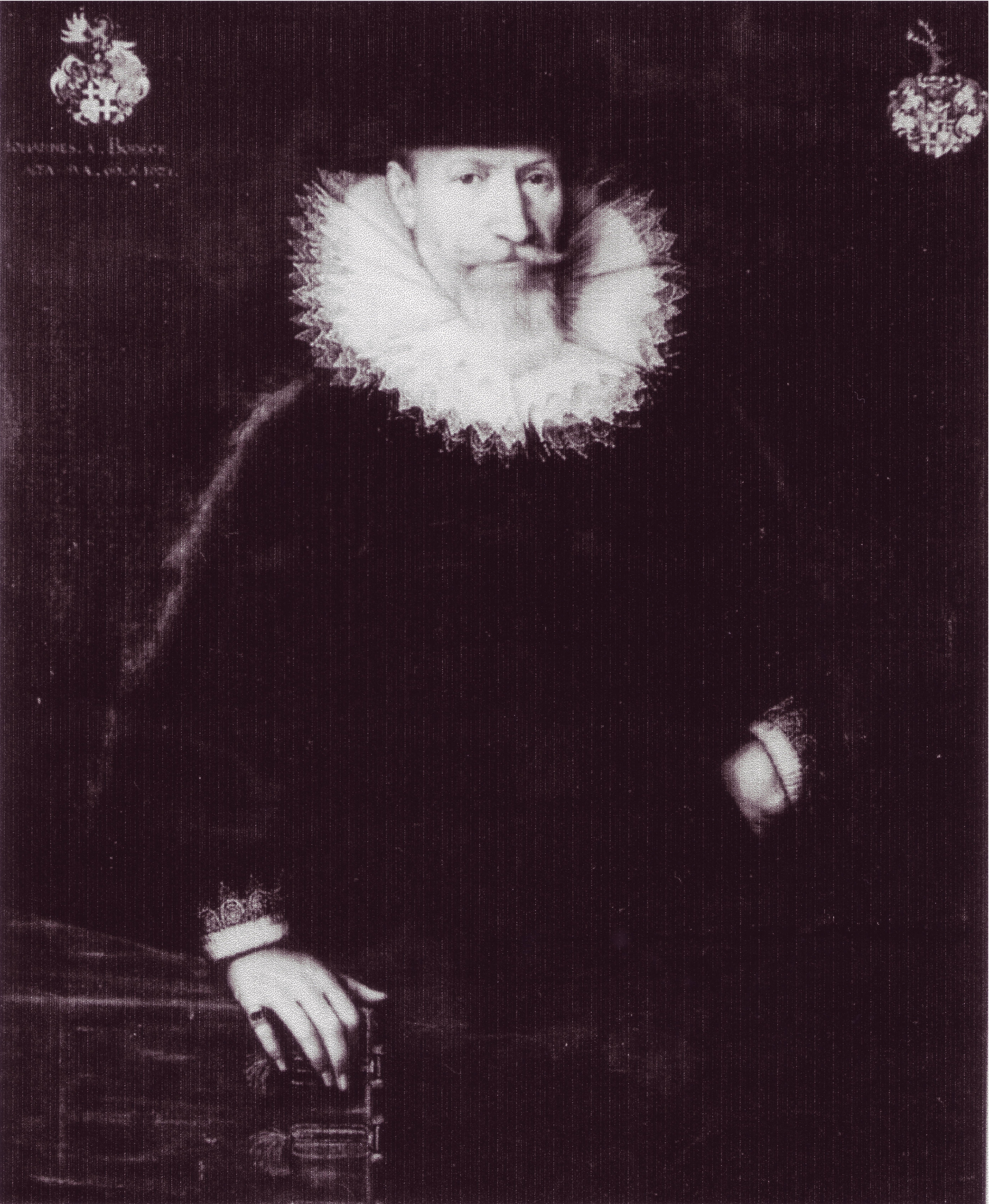 Foto eines Gemäldes des Johann von Bodeck, * 1555, gestorben 1631